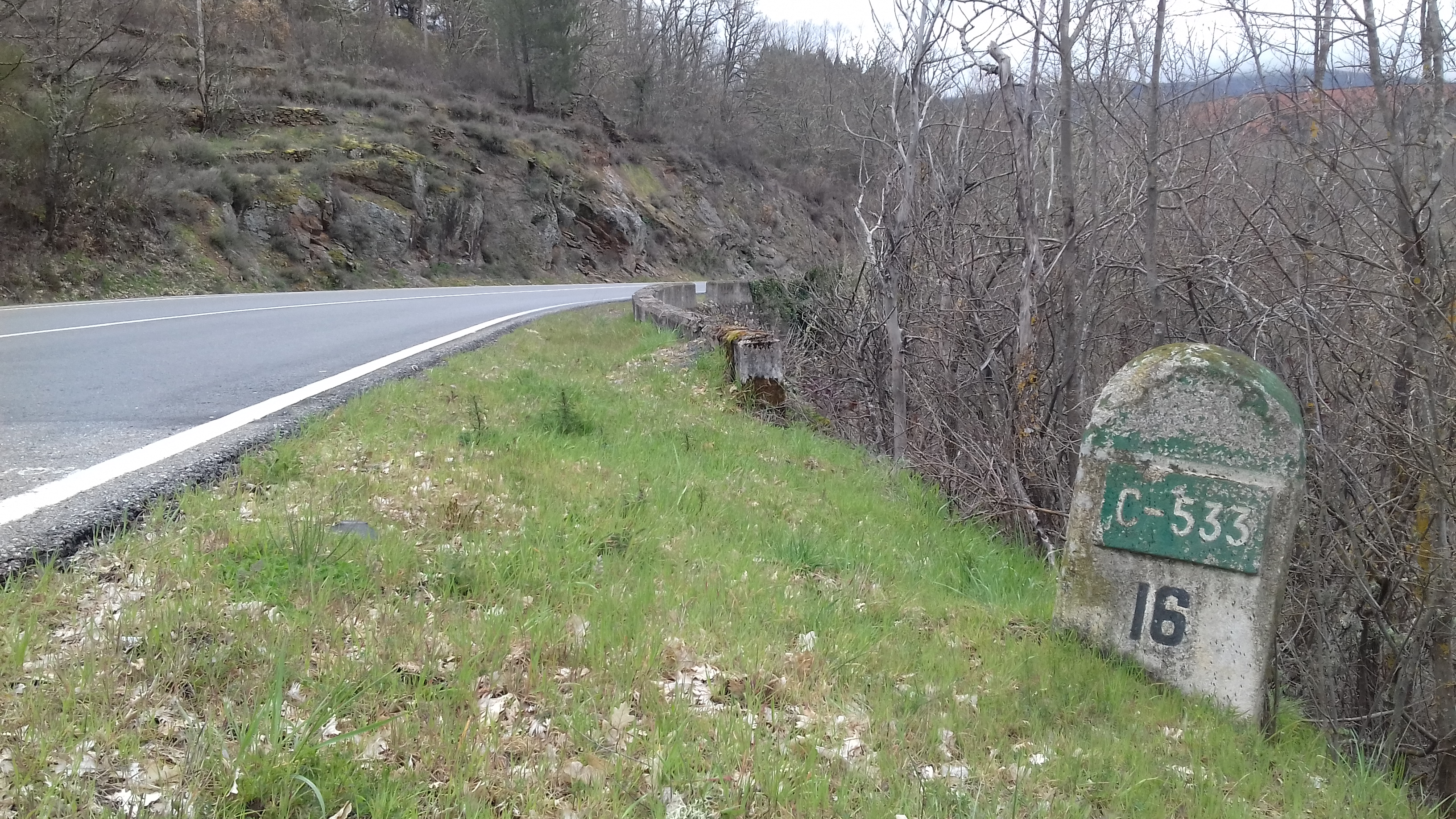 Fito quilométrico nº 16 da estrada C-533, no concello de Viana do Bolo